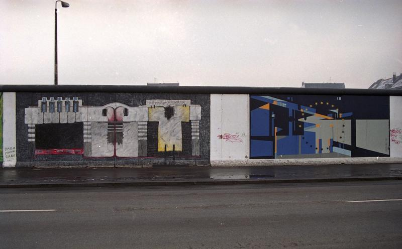 19.12.1990 "East-Side-Galery", gelegen zwischen der Jannowitzbrücke und der Oberbaumbrücke Reste der Berliner Mauer, die nach der Öffnung von vorwiegend ostdeutschen Künstlern auf der Ost-Seite bemalt wurden